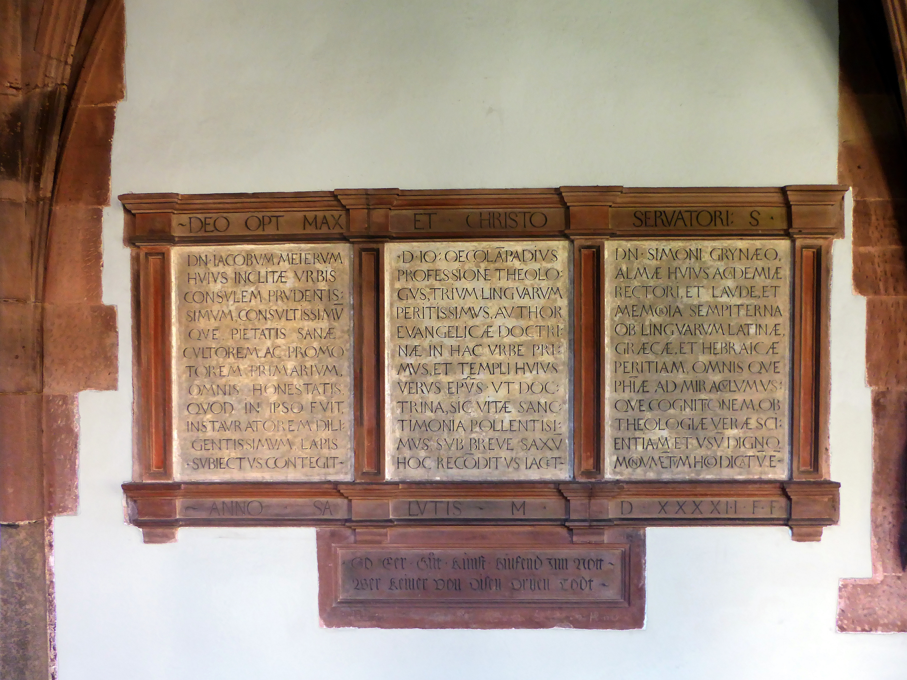 Den Epitaph für Jakob Meyer, Johannes Oekolampad und Simon Grynaeus ziert eine lateinische Grabschrift in klassischer Antiqua im Sinne des Humanismus. In deutscher Schrift steht darunter ein reformatorischer Spruch: «So ehr/guot/kunst, hülffend in noth, wer keiner von den dreyen todt». («Könnten die Ehre, die sie erworben, das Gute, das sie getan, und die Kunstfertigkeit, das Können, das sie bewiesen haben, in der Not helfen, dann wäre keiner von diesen dreien tot».)